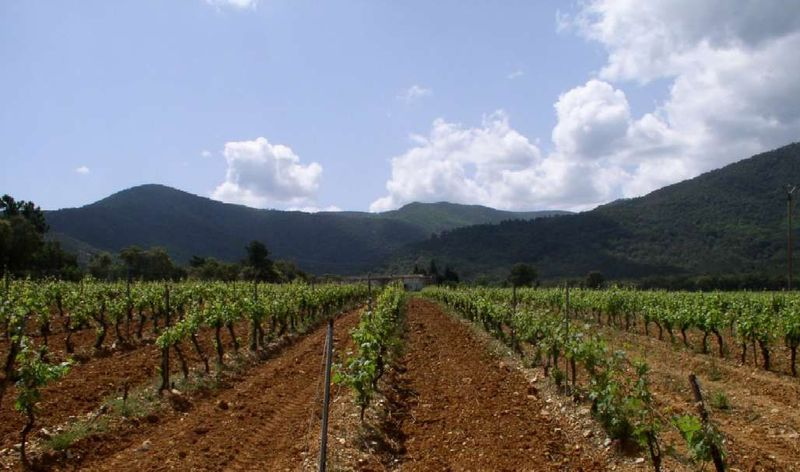 Vignes près des Mayons, Var, France